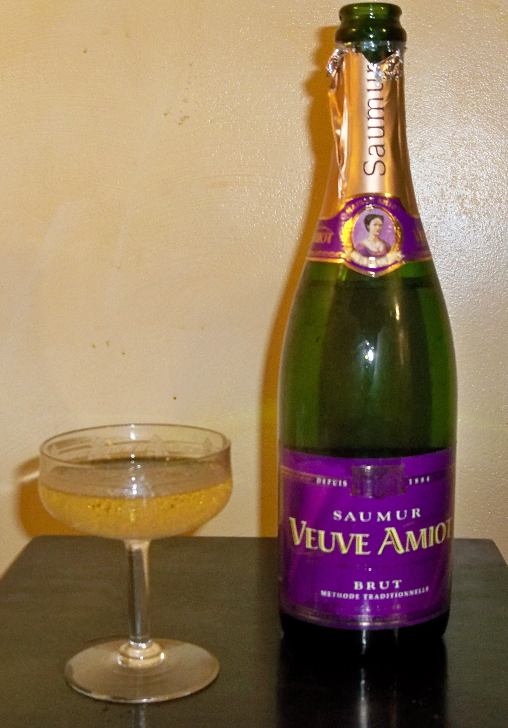 bouteille de Saumur avec coupe, Val de Loire